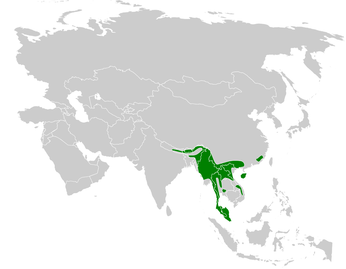 Melanochlora sultanea distribution map